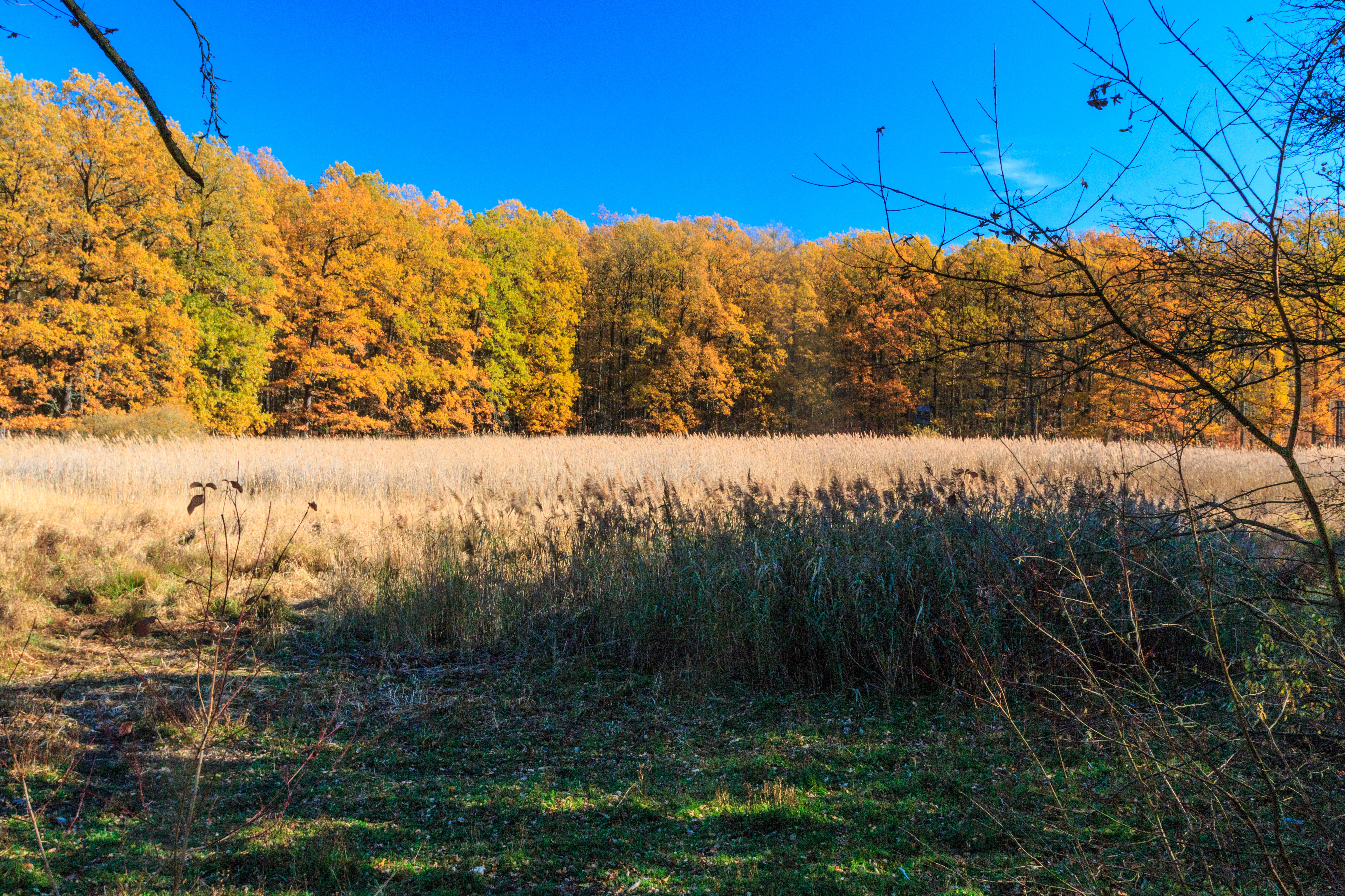 Rybník Pařízek u Rožďalovic